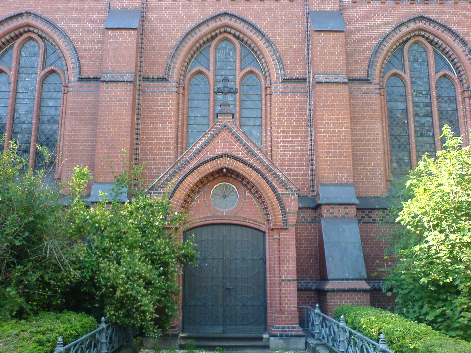 Bildbeschreibung: St. Petri Portal Altona Fotograf/Zeichner: PodracerHH 23:54, 10. Jul 2006 (CEST) Datum: 07.2006 Sonstiges: ...